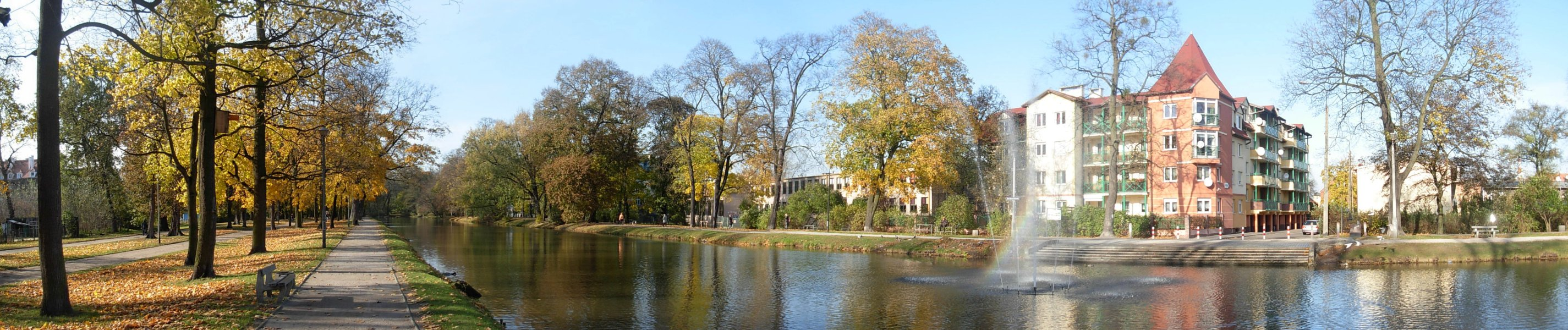 Planty nad Kanałem Bydgoskim